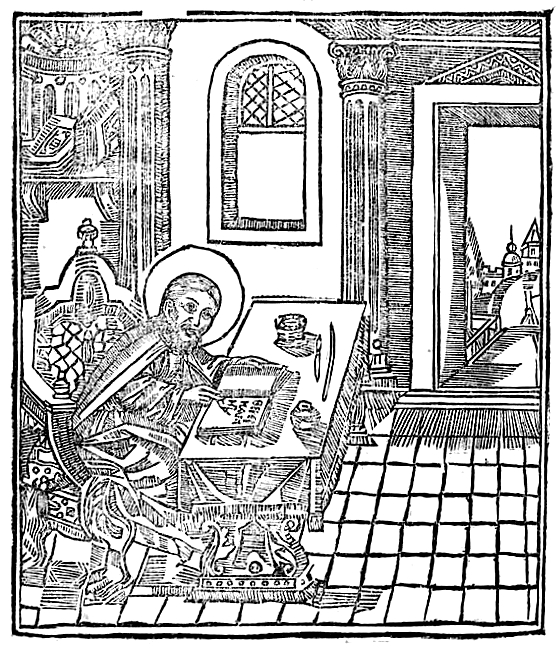 Иоанн Дамаскин. «Октоих». Кутеинская типография.